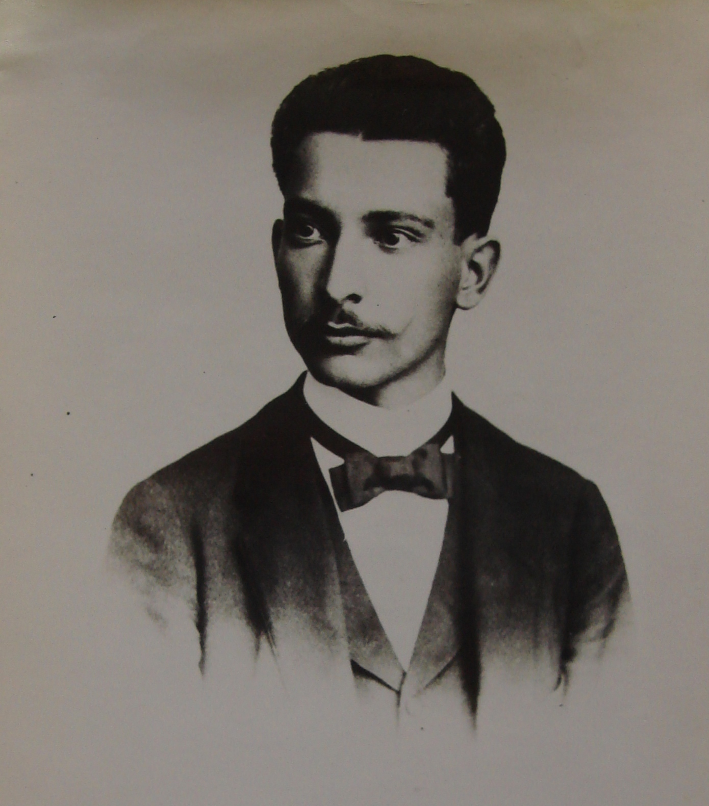 Francisco Valle (1869-1906) em 1891, aos 22 anos